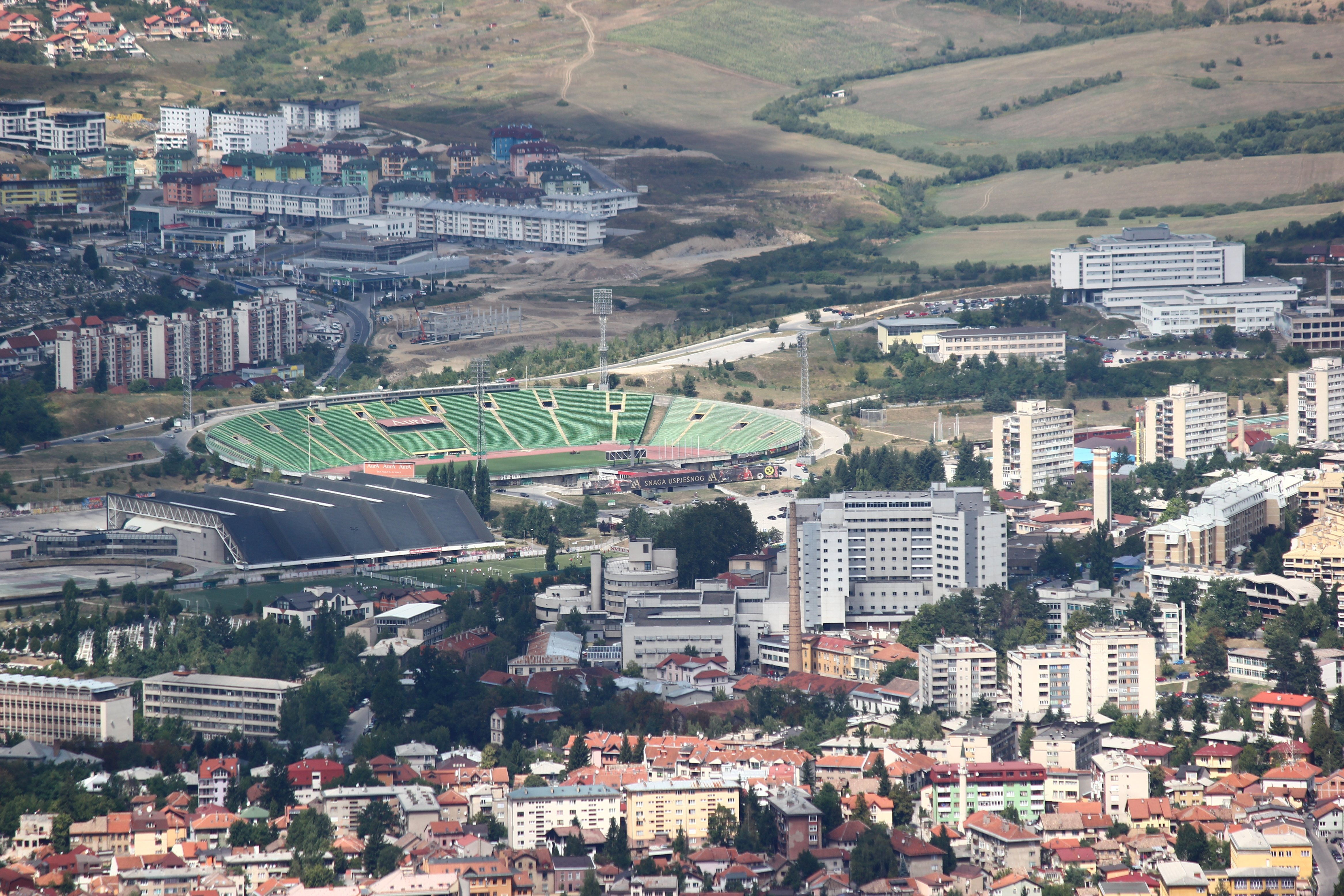 Blick vom Trebević auf das Stadion Asim Ferhatović Hase in Sarajevo, 2012.